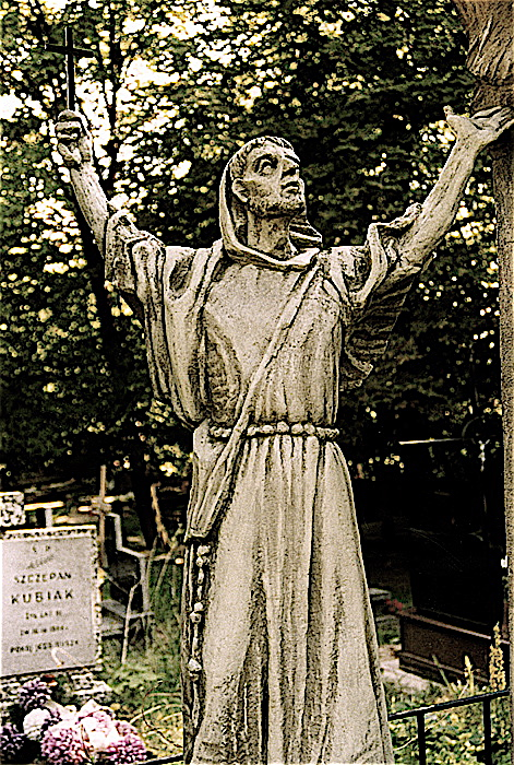 Rzeźba św. Franciszka Kwatera Franciszkanów, Cmentarz Łagiewnicki Łódź 1997